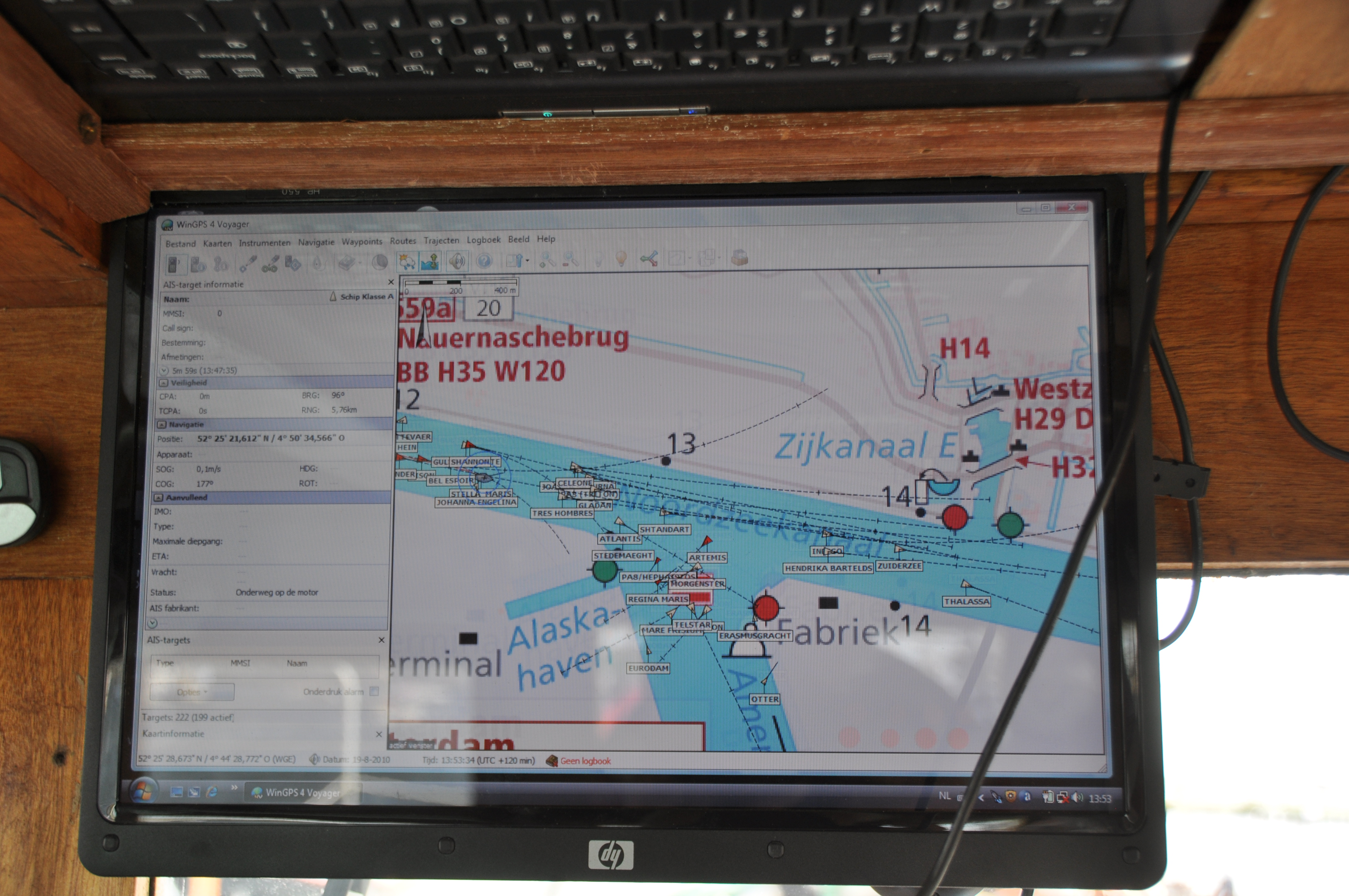 Een foto van de Sail-in parade van Sail Amsterdam 2010.